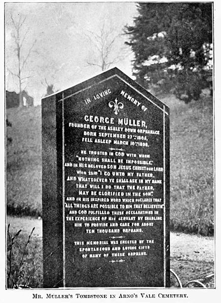 George Müller's Tombstone.